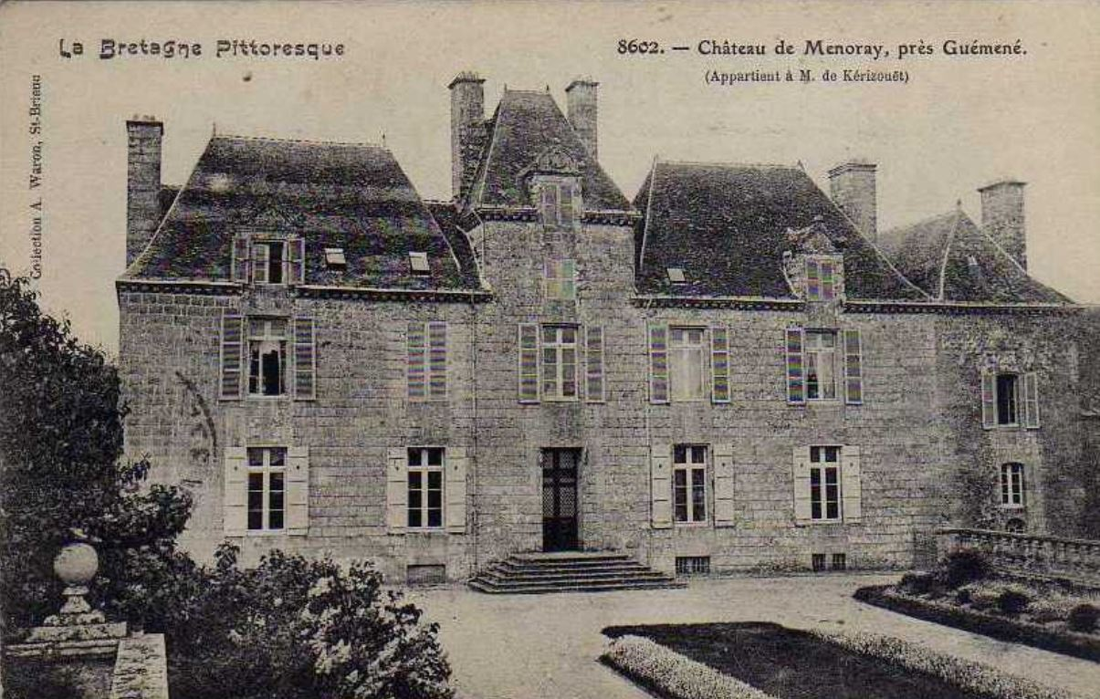 Le château de Ménoray en Locmalo vers 1900 (carte postale ancienne)